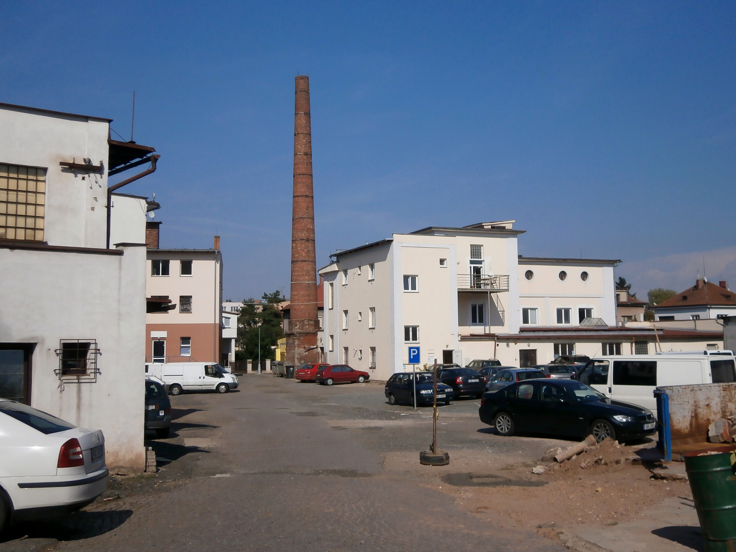 Velkopekárna Ústředního konsumního družstva (Na Okrouhlíku čp. 1630)